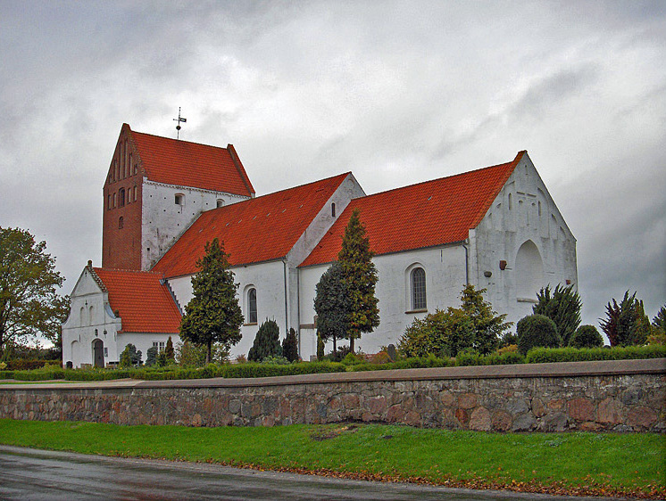 fra sydøst